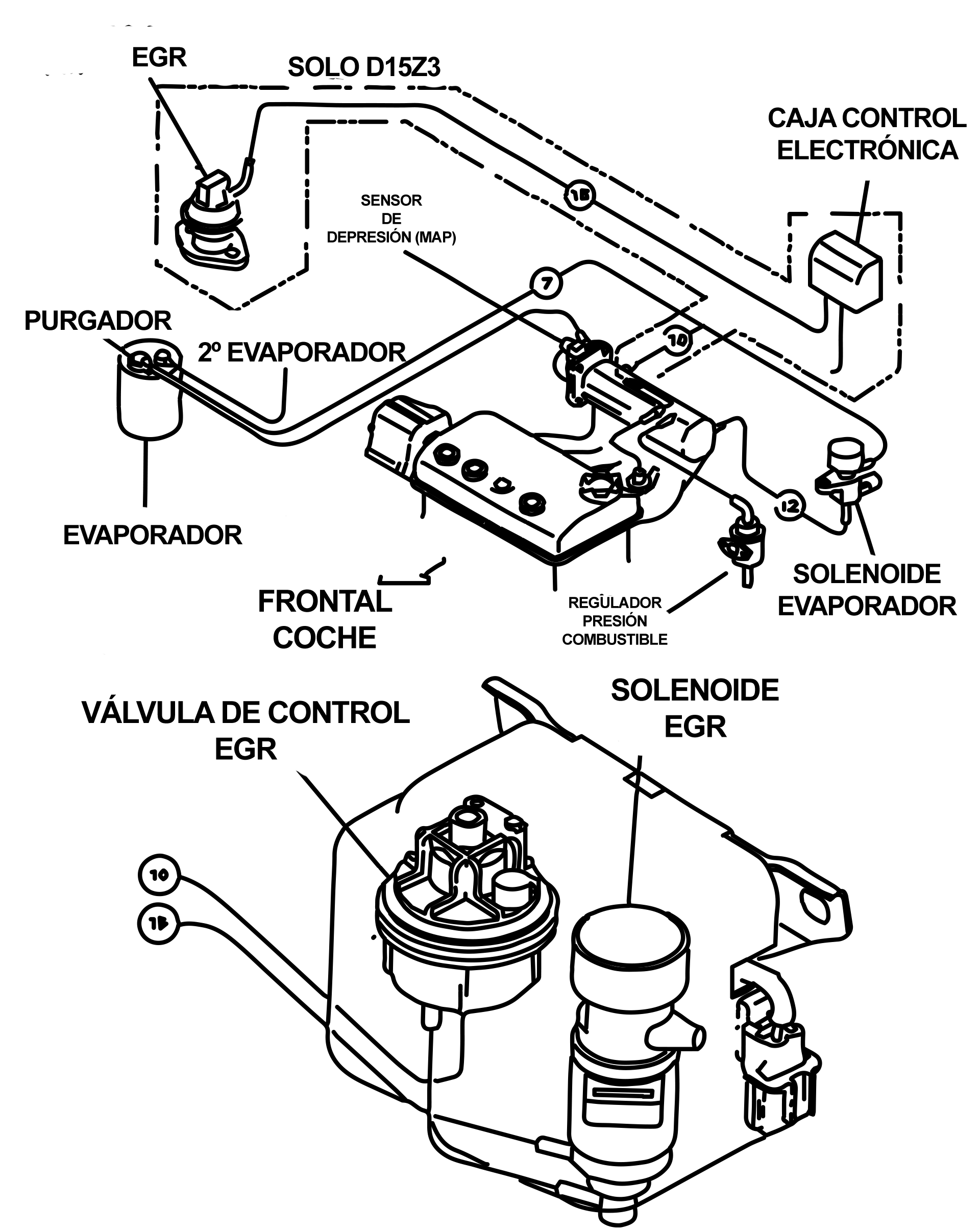 Sistema anticontaminación del motor D15Z3 del Honda Civic MA9 en el que se incluye la válvula EGR para recircular los gases y así reducir la temperatura de combustión en la cámara, prevenir picados no deseados sin tener que alterar el encendido y bajar el consumo.